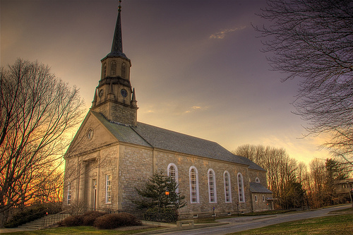 Harkness Chapel